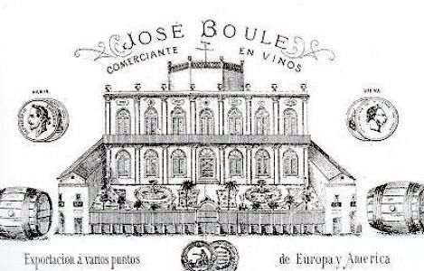 Marca de la casa Josep Boule, bodegues